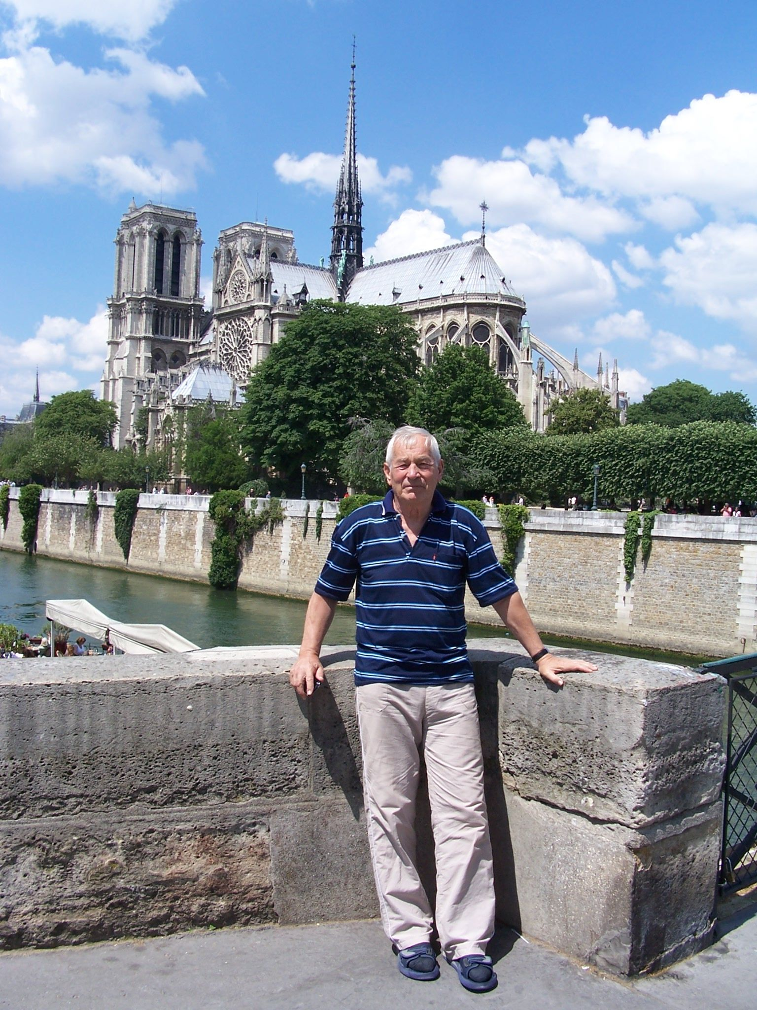 фото Сосинского Алексея